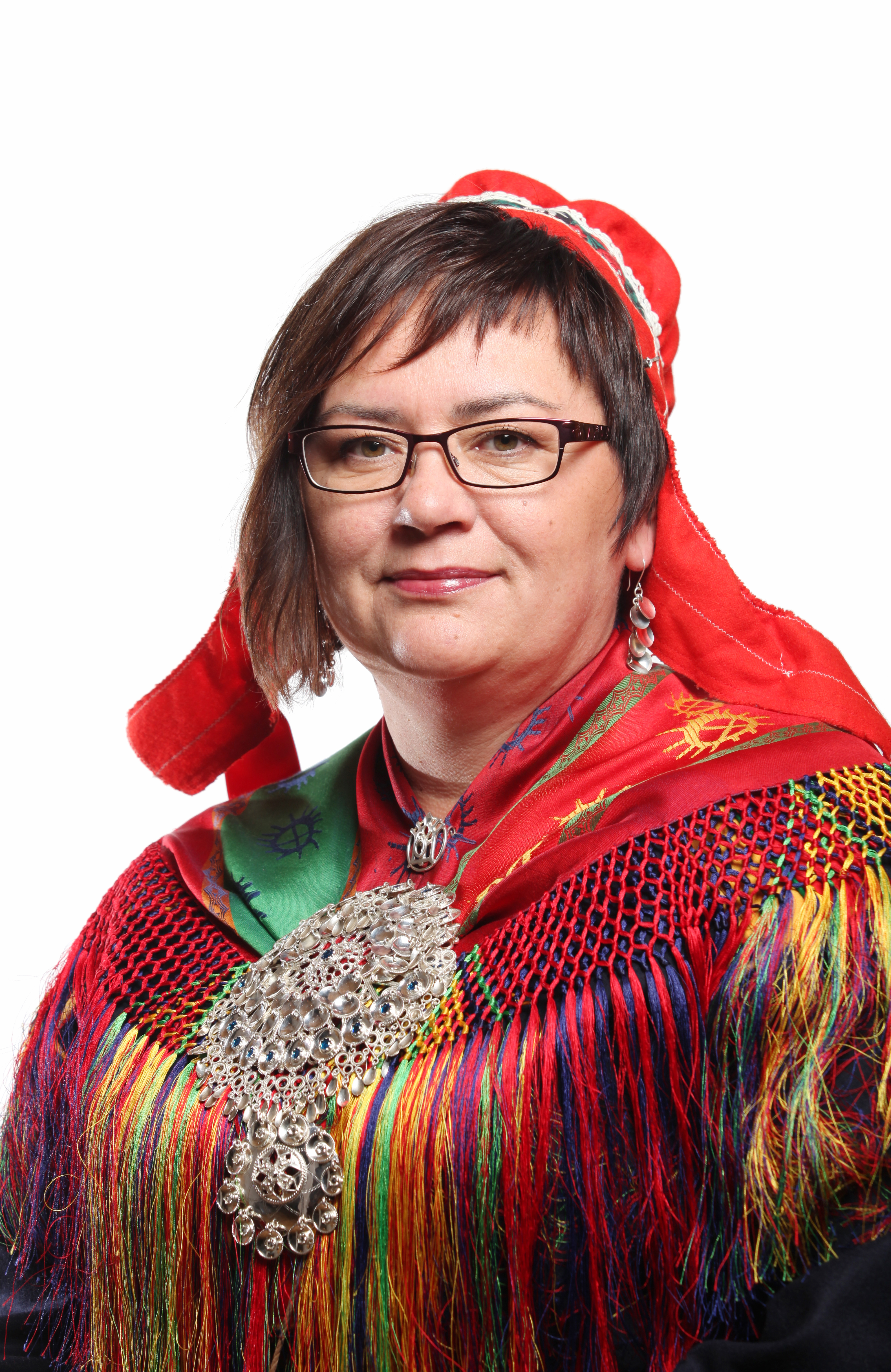 Leder av næring- og kulturkomitéen. Foto: Kenneth Hætta / Sametinget.